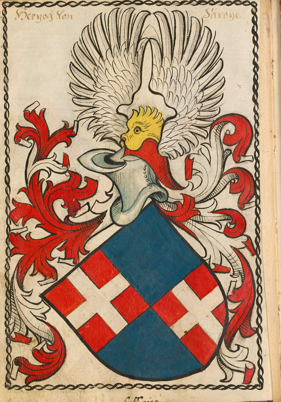 Scheibler'sches Wappenbuch , älterer Teil Herzog von Savoyen